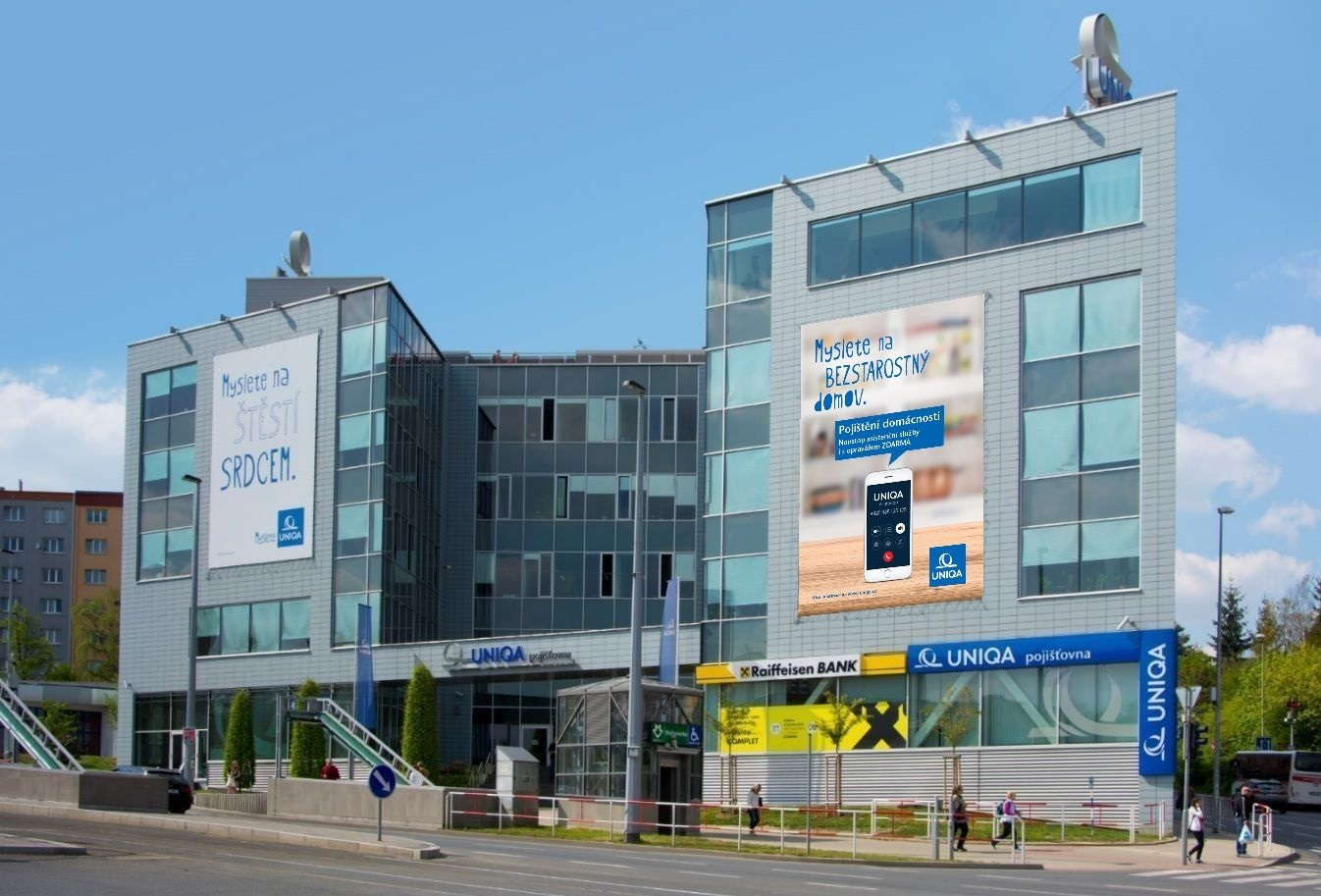 UNIQA pojišťovna, centrála